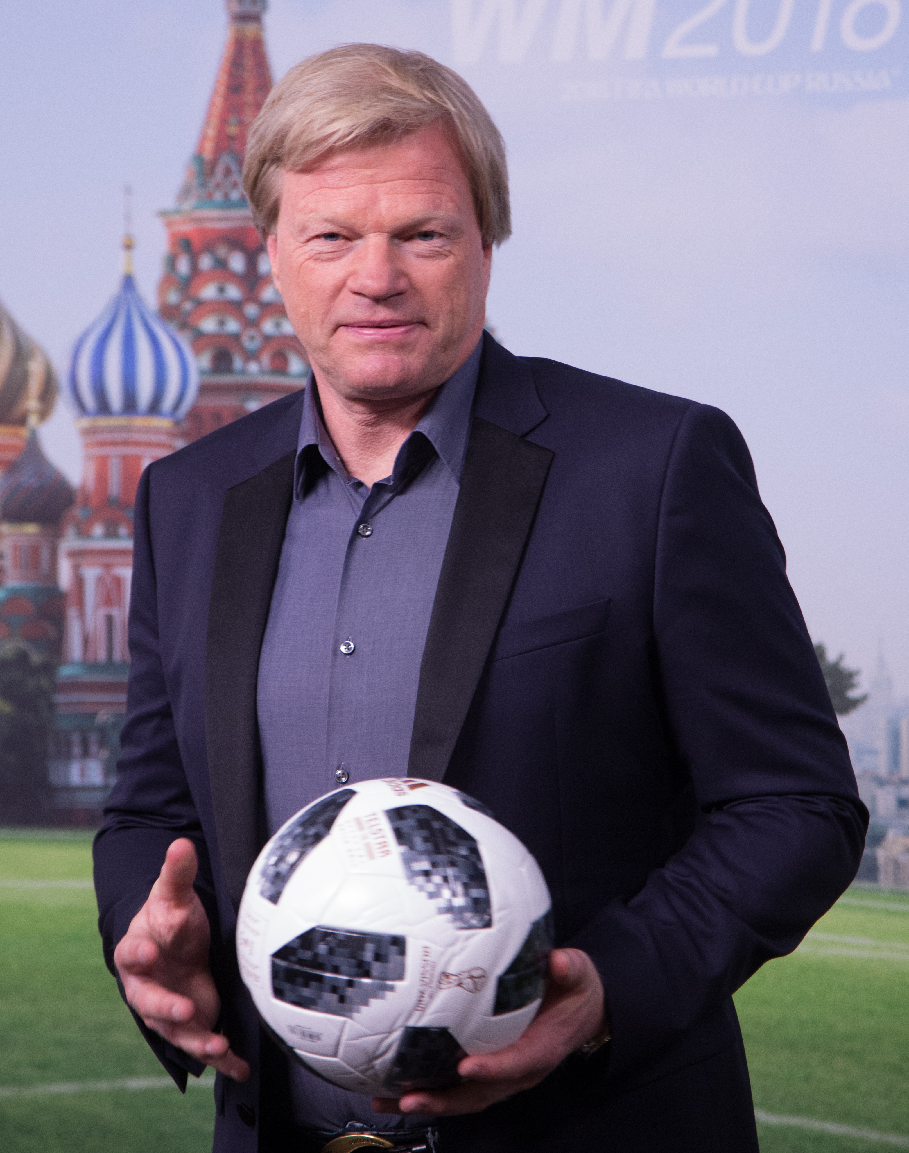 FIFA WM 2018 Pressevorstellung von ARD und ZDF in Hamburg: Oliver Kahn